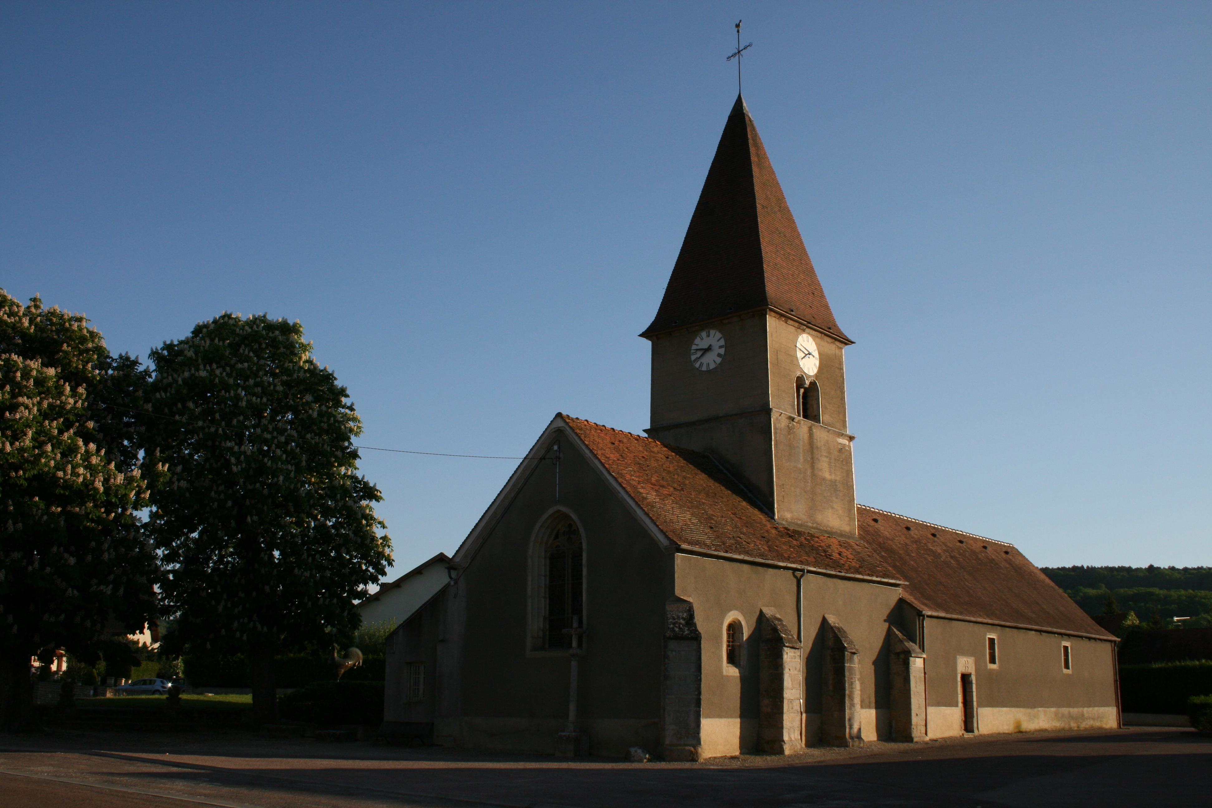 Venarey les Laumes Eglise Saint Germain ( Venarey )